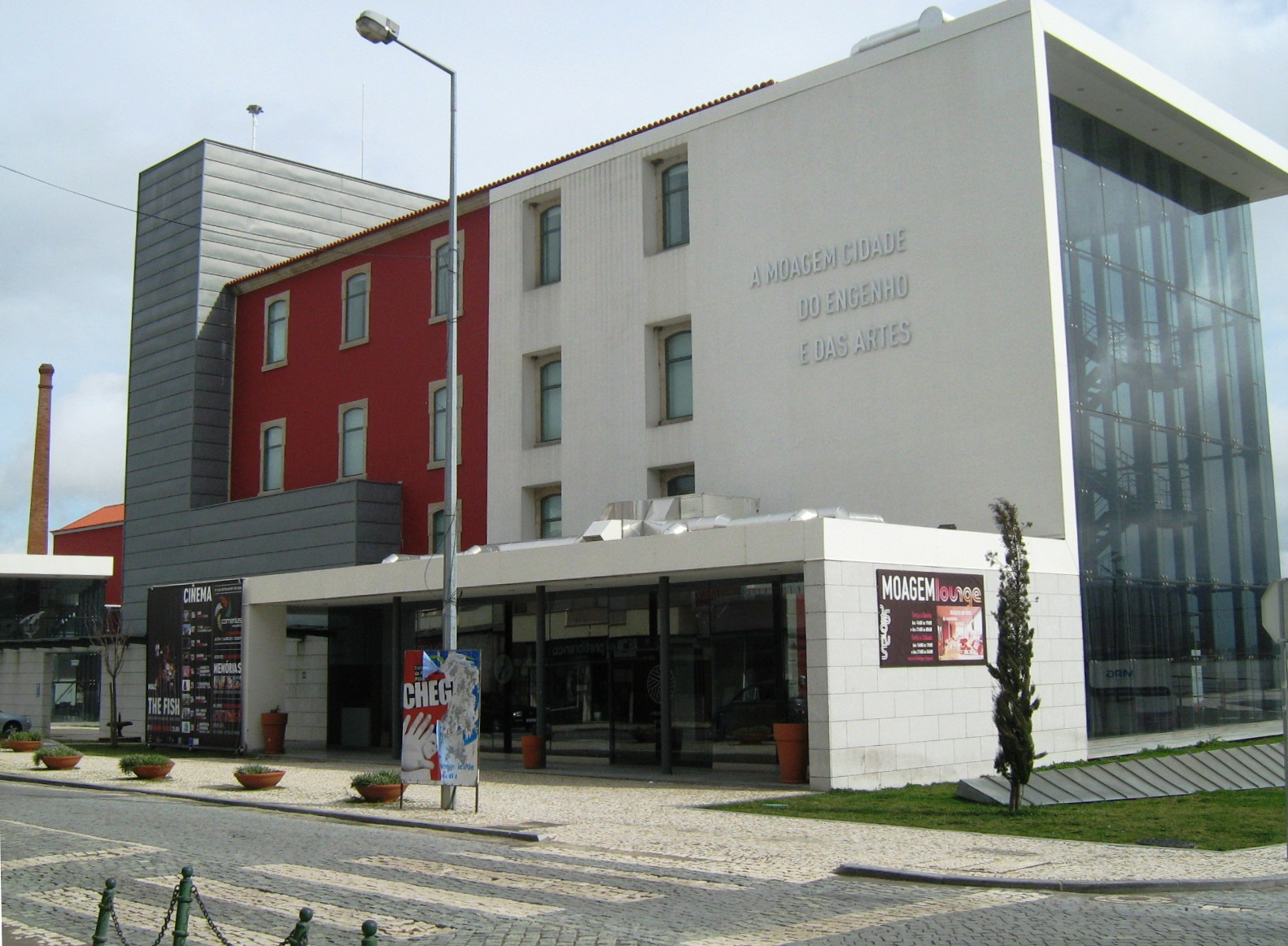 A Moagem - Cidade do Engenho e das Artes. Da restauração de uma antiga moagem do Fundão, que se manteve em funcionamento entre os anos 20 e 80 do século XX, nasceu um espaço multifacetado que inclui um museu, auditório, sala de exposições, cinema, restaurante e bar panorâmico.